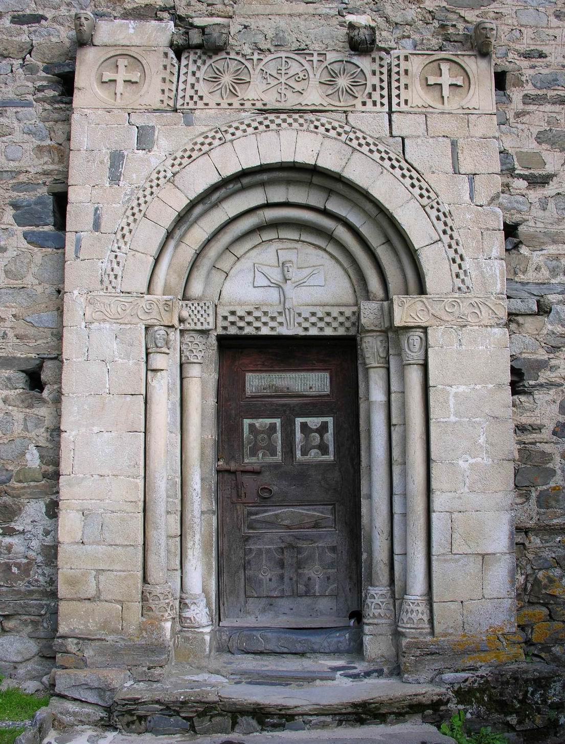 Portalada de l'església, oberta al mur nord. Final del segle XII i primera meitat del XIII.